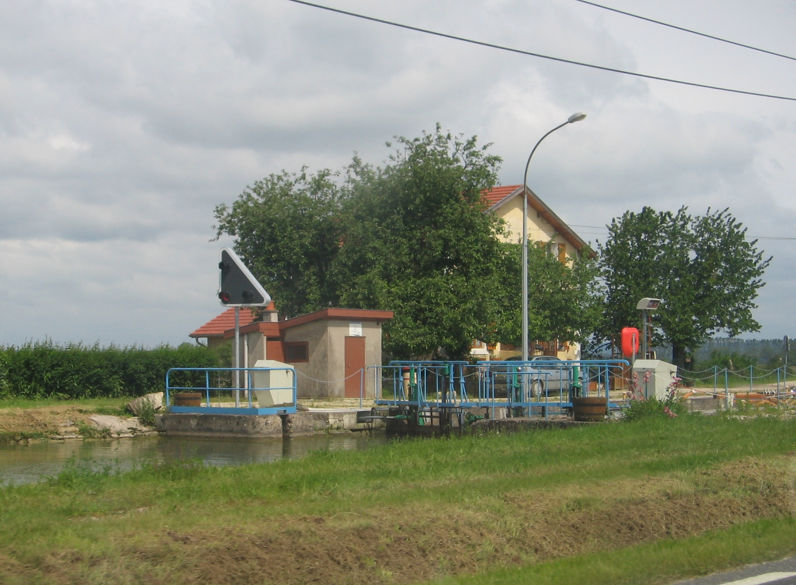 Écluse de Sep N° 29 du Canal de la Meuse